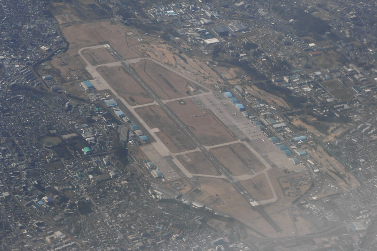 ANA松山行きの機内から撮影した米海軍厚木基地。駐機している機体がいる様だ。